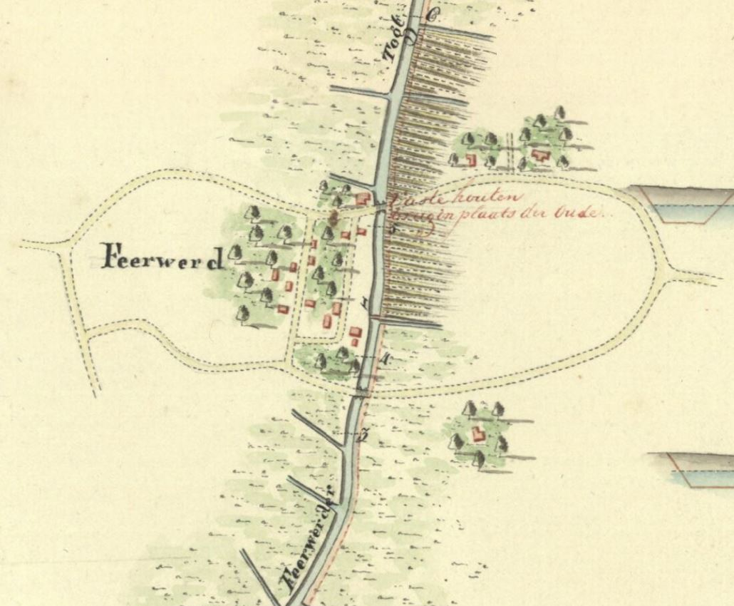 Plattegrond van Feerwerd met de loop van de Feerwerdertocht voor het graven van het Oldehoofsch kanaal tussen 1825 en 1827. Uitsnede van de "Kaart van het Aduarderdiep als mede van de Feerwerder en Ezinger Togten met de Oldenhoofster Riette en derzelver dwars profillen, aanduidende het project wegens het aanleggen van trekwegen langs gemelde kanalen en verwijding van dezelve benevens het graven van gedeeltens nieuwe kanalen tusschen de dorpen Feerwerd, Ezinge en Saaksum" van W. van Rees.